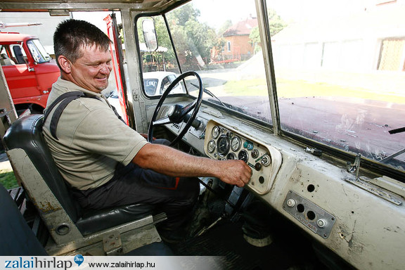 Belülről